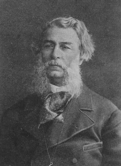 Григорович Дмитрий Васильевич. Начало 1880-х годов. Санкт-Петербург.